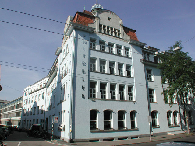 Die Fassade des Studiengebäudes UniTobler der Universität Bern, das früher die Schokoladenfabrik Tobler beheimatete, seit den 90er Jahren die Theologische Fakultät und andere Geistes- und Sozialwissenschaftliche Zweige aufnimmt. Für den gelungenen Umbau mehrfach preisgekrönter Gebäudekomplex, Länggassstrasse, Bern, Schweiz.